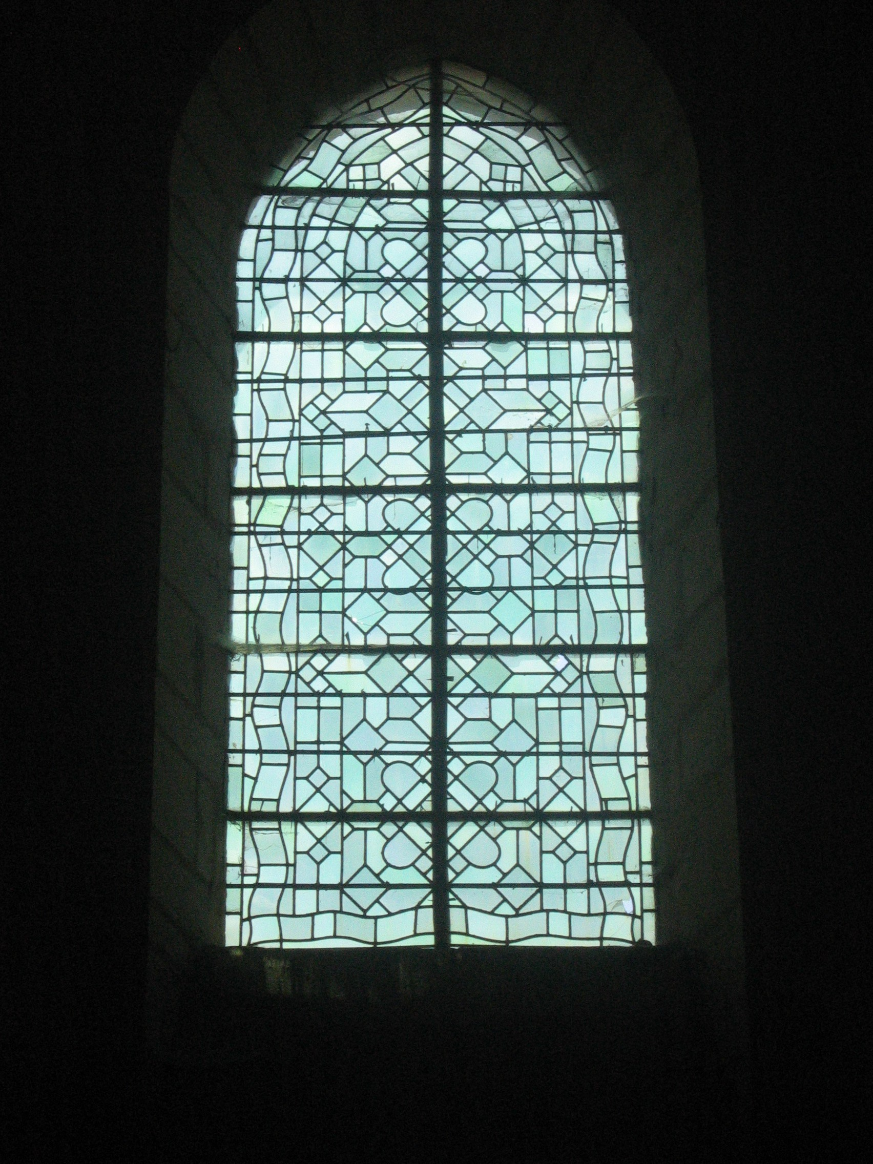 Abbaye de Pontigny, Yonne, France. Vitrail.